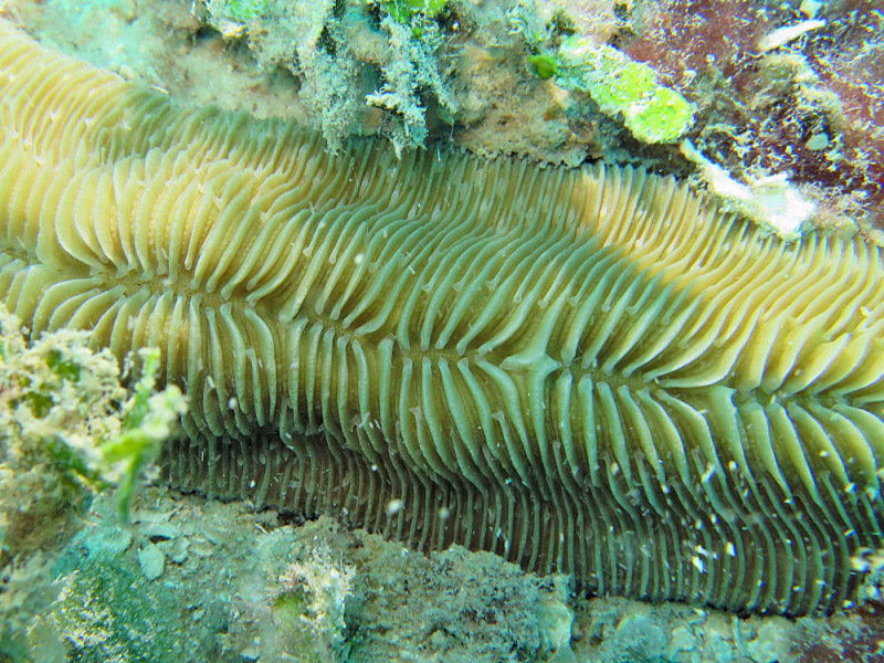 Vista parcial de colonia de Herpolitha limax, mostrando los septa que radian desde cada boca. Profundidad 22 m. Coconut Beach, isla Lizard, Australia